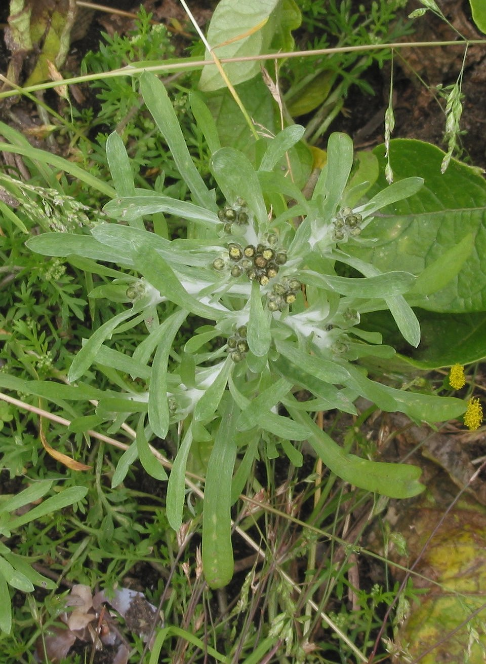 (nl: Moerasdroogbloem plant) Gnaphalium uliginosum